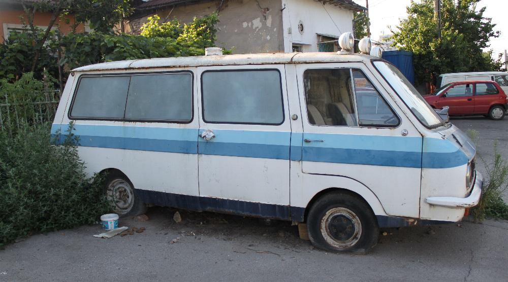 Bulg. Krankenwagen auf Fahrgestell RAF-2203 "Latvija"